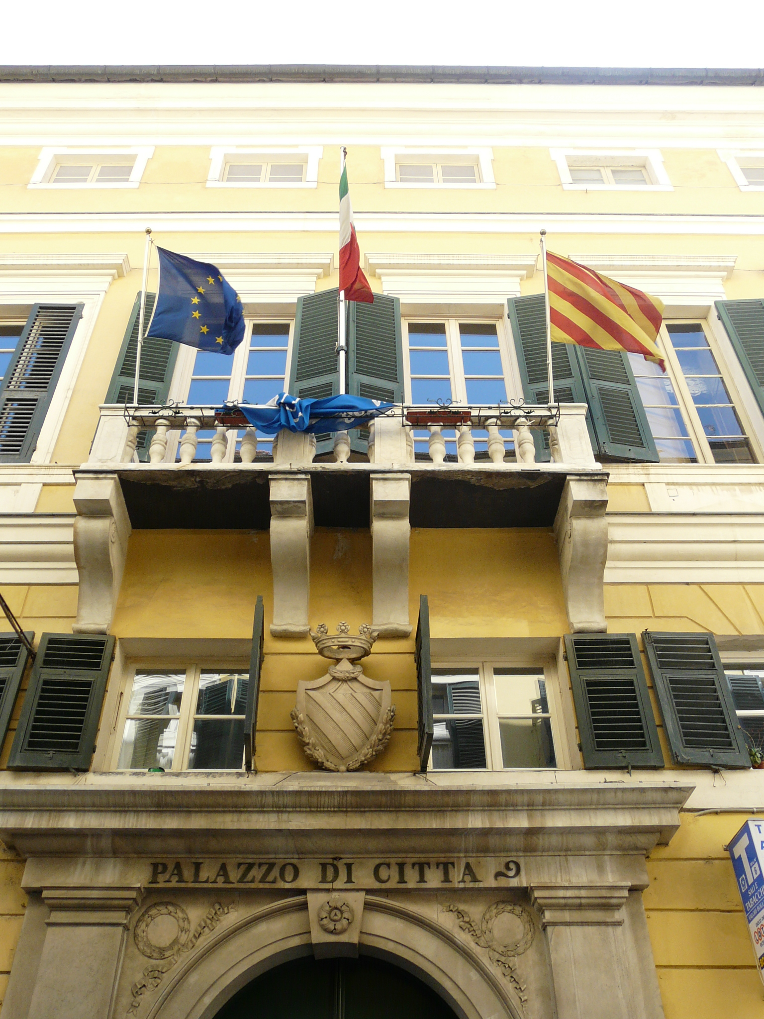 Municipio di Finale Ligure, Liguria, Italia